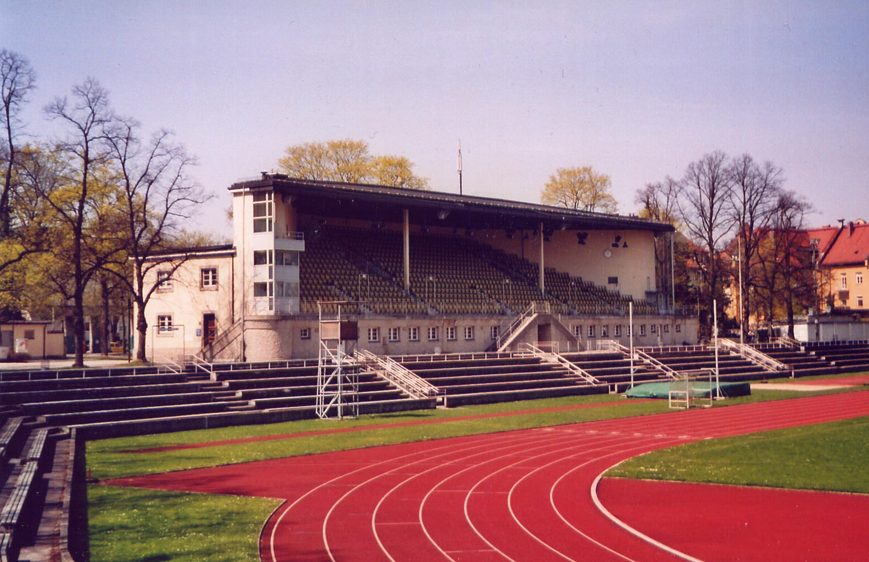 Dantestadion in Munich